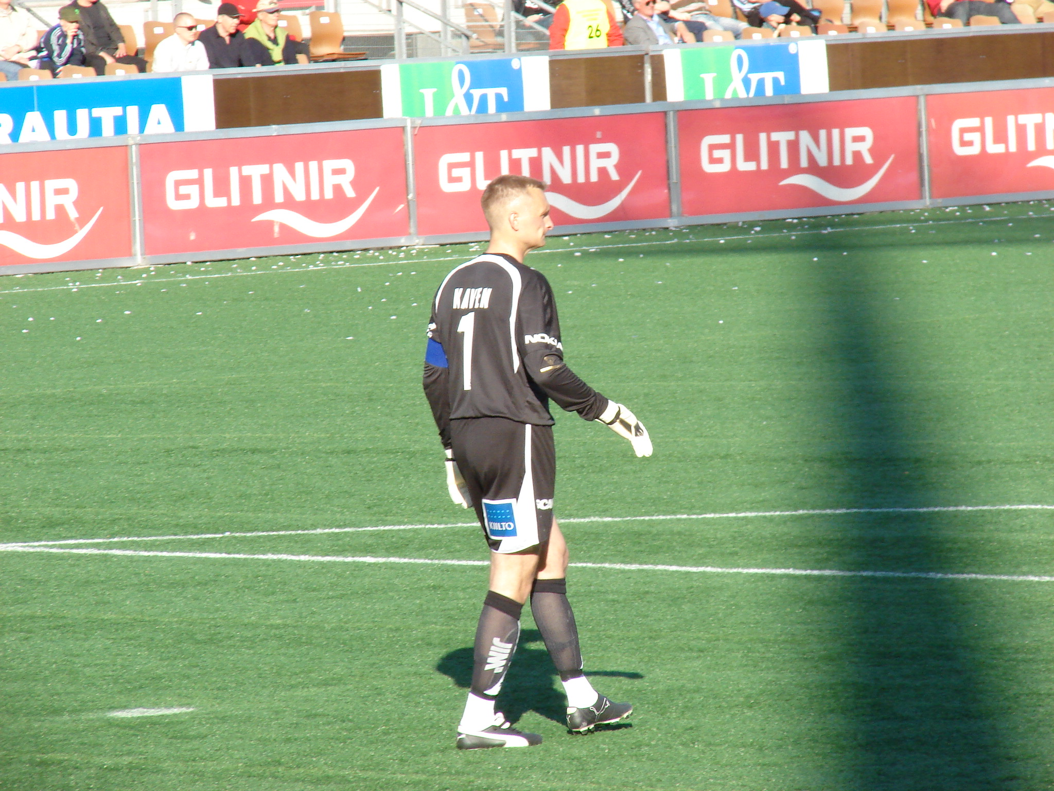 Description